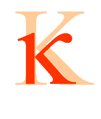 Greek letter